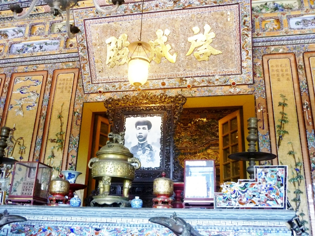 Thể Loại:Di tích cố đô Huế Thể loại:Lăng tẩm các Vua chúa Nguyễn Thể loại:Di tích ngoài Kinh Thành Huế